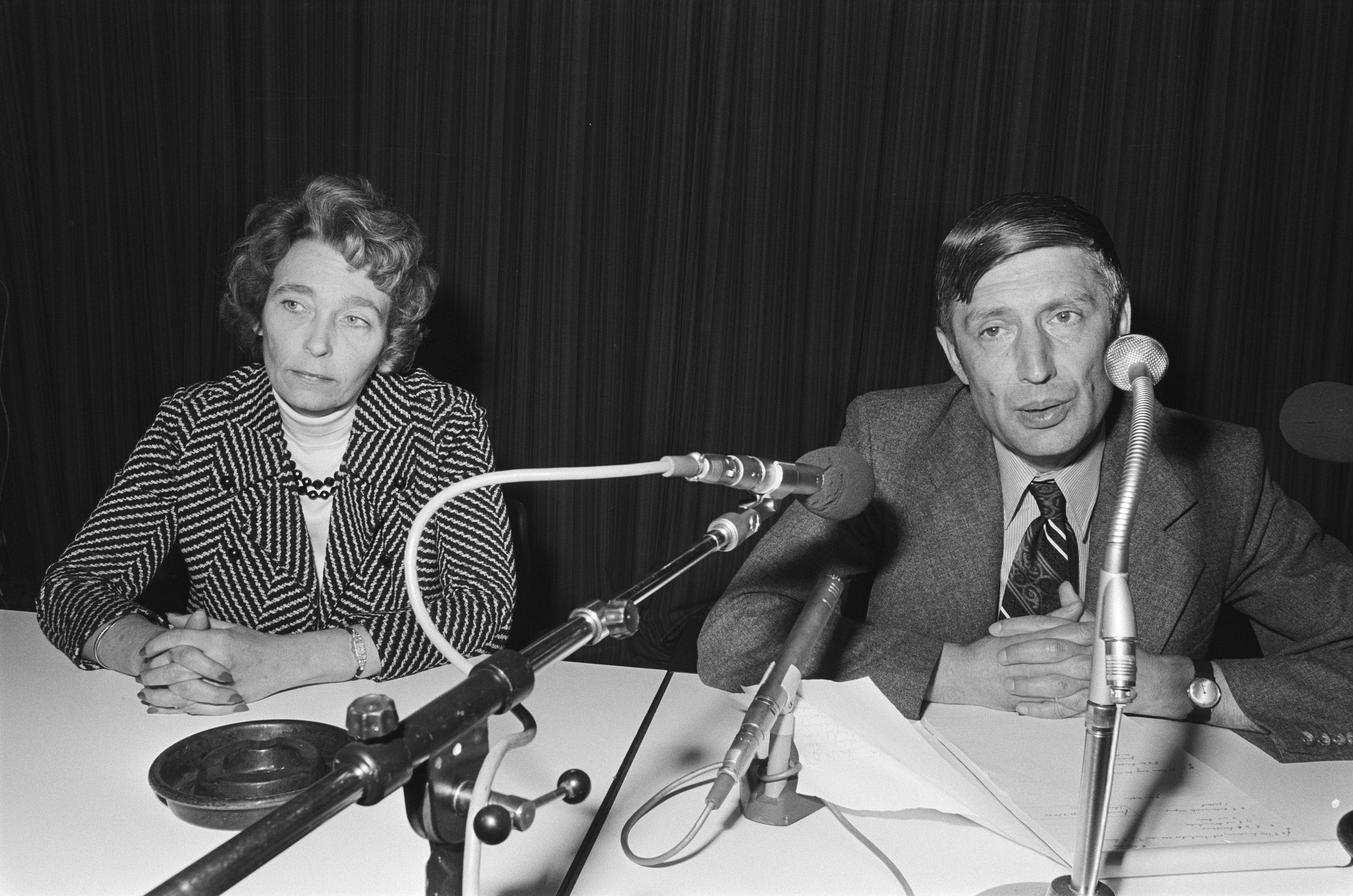 Collectie / Archief : Fotocollectie Anefo Reportage / Serie : [ onbekend ] Beschrijving : Eerste dag gijzeling trein bij De Punt ; minister Van Agt en Toos Faber tijdens persconferentie Datum : 23 mei 1977 Trefwoorden : gijzelingen, persconferenties, treinen Persoonsnaam : Agt, Dries van, Punt, De Fotograaf : Peters, Hans / Anefo Auteursrechthebbende : Nationaal Archief Materiaalsoort : Negatief (zwart/wit) Nummer archiefinventaris : bekijk toegang 2.24.01.05 Bestanddeelnummer : 929-1910